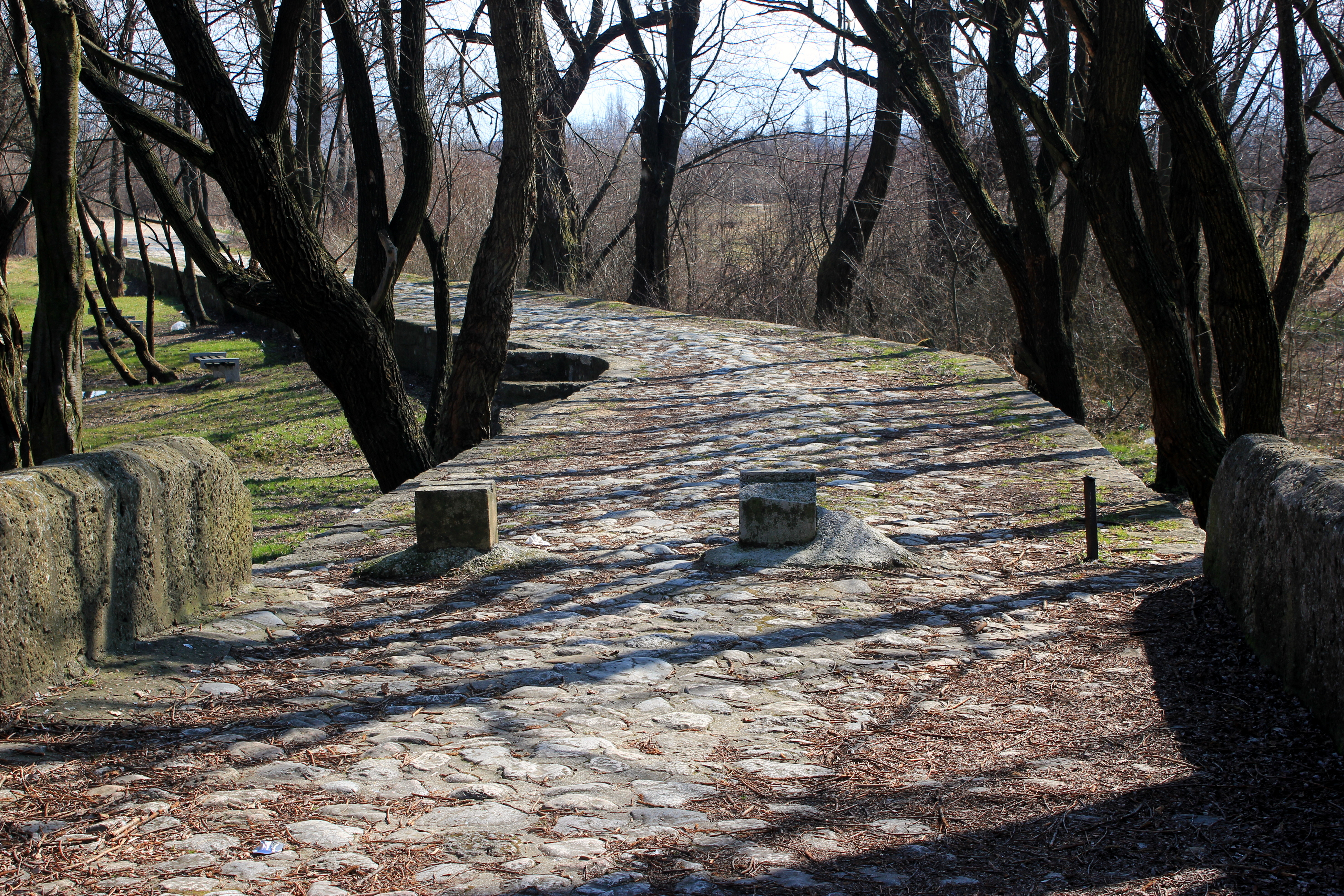 Die Steinbogenbrücke Rimski most über die Bosna bei Ilidža.